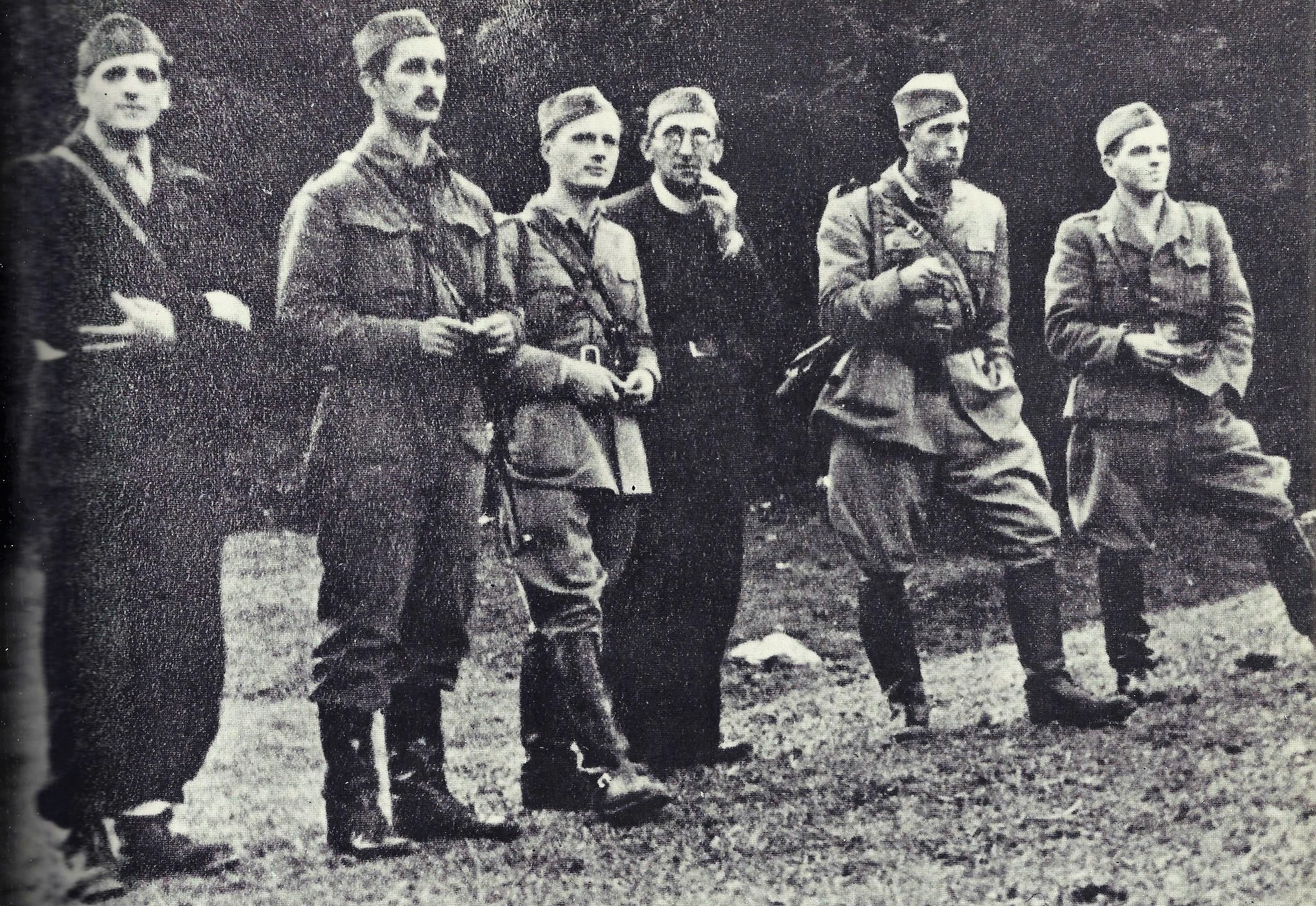 Miting po prihodu Rabske brigade v Slovenijo. Predstavniki divizije in glavnega štaba. Od leve proti desni namestnik komandant Rabske brigade Anton Vratuša, pesnik Karel Destovnik-Kajuh, komisar XIV. divizije Jože Brilej-Bolko, verski referent XIV. divizije Jože Lampret, komandat XIV. divizije Mirko Bračič in komandat glavnega štaba Slovenije Franc Rozman-Stane